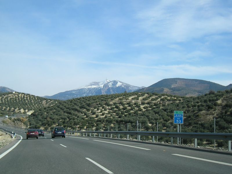 Imagen de la autovía A-44 (Bailén-Motril), a la altura del municipio de Pegalajar, en la provincia de de Jaén (España), dirección Granada.